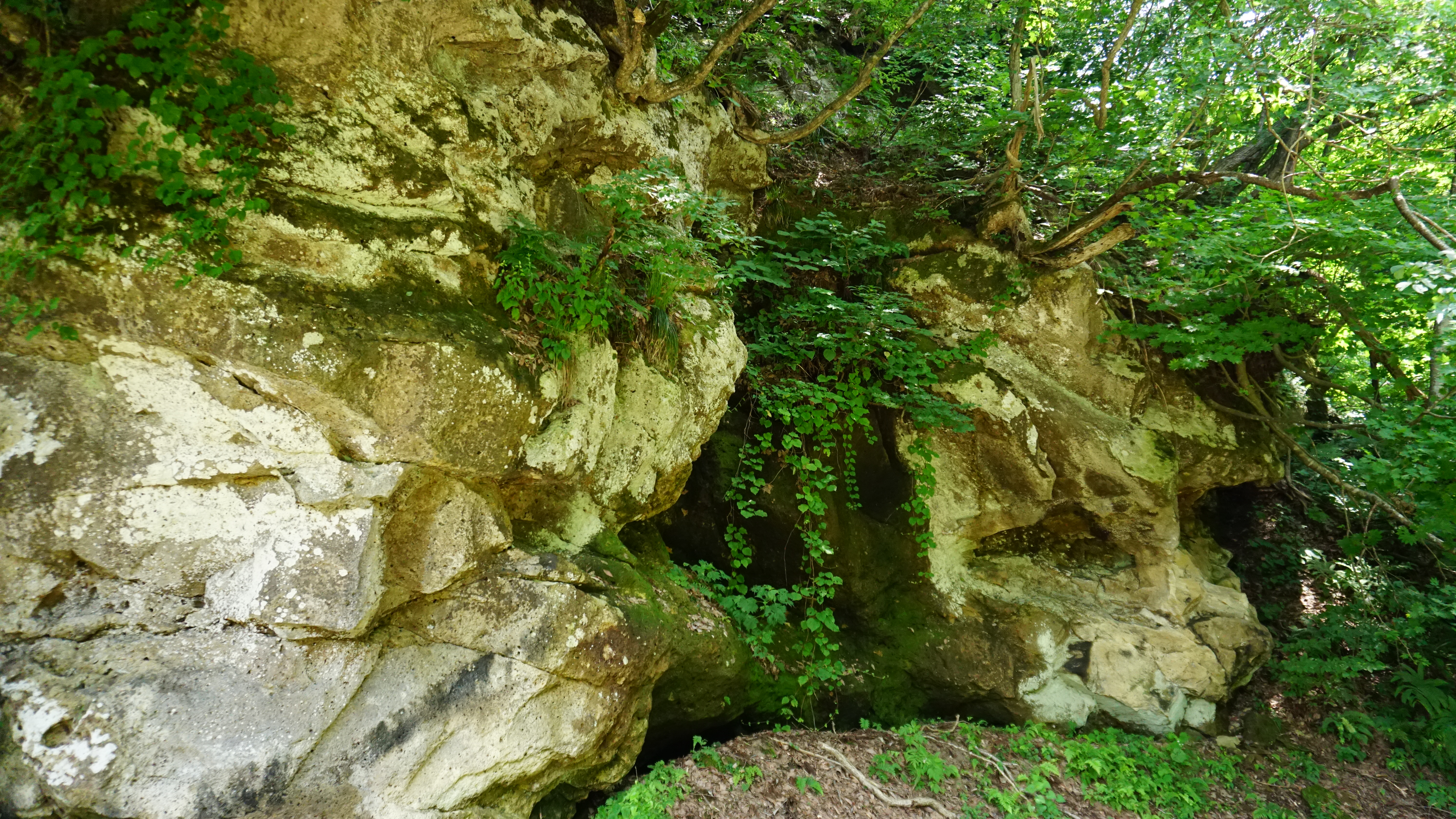 岩井堂洞窟遺跡（秋田県湯沢市）。縄文時代の岩陰遺跡である。